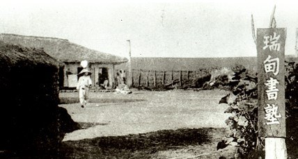 中文（中国大陆）: 中国朝鲜族的第一所近代新式学校瑞甸书塾